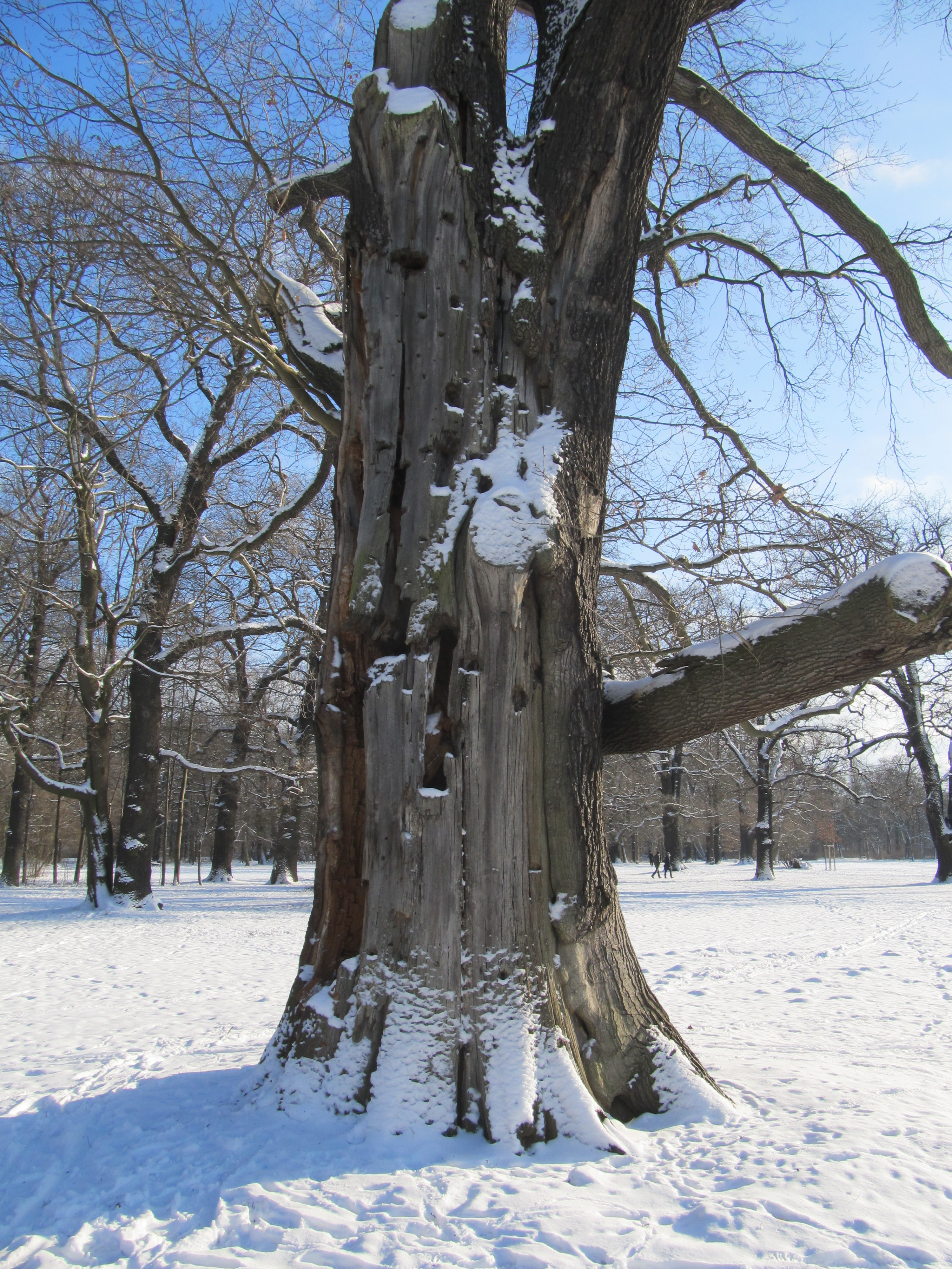 Splittereiche im Großen Garten, Dresden